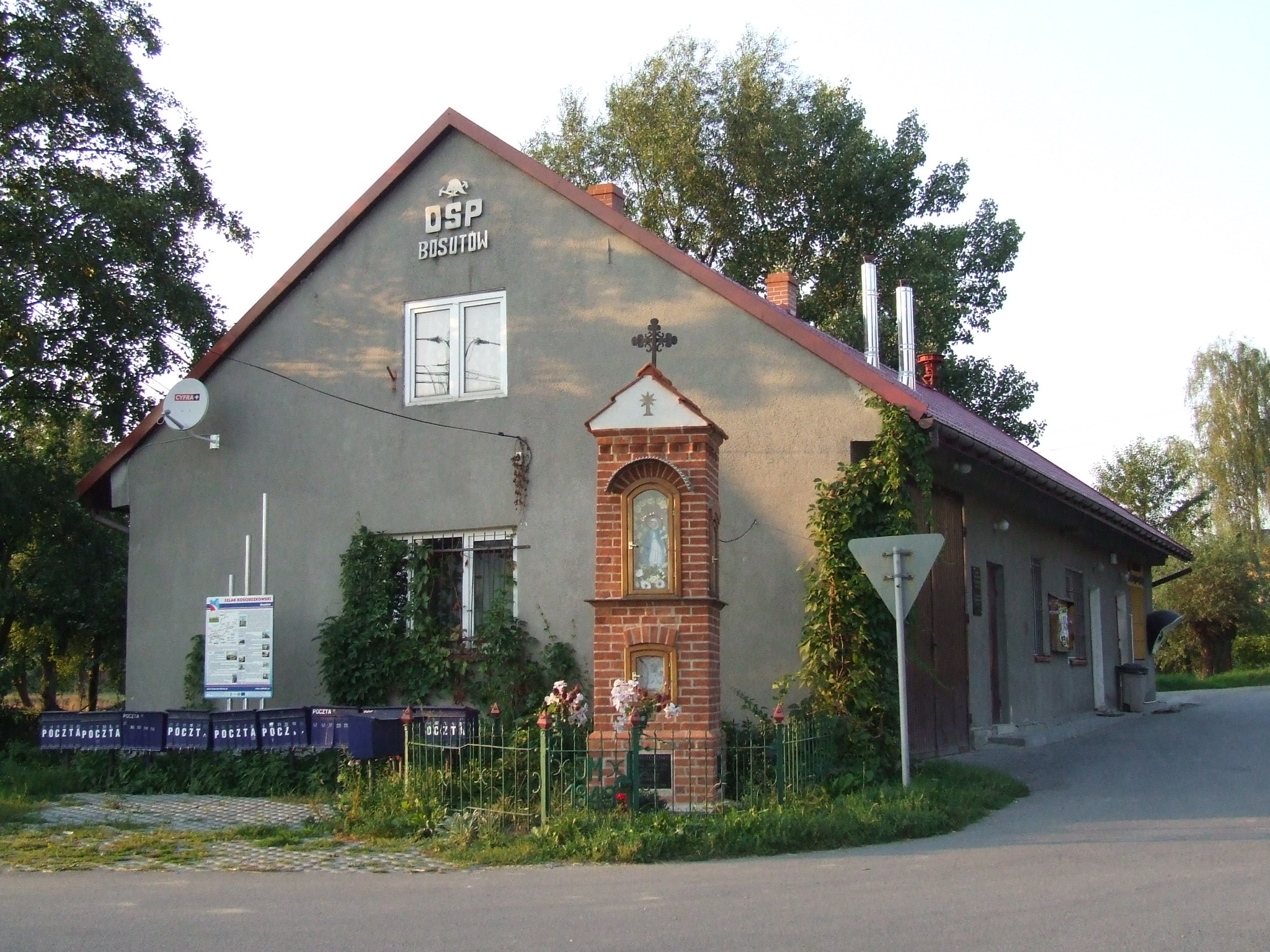 Bosutów, budynek OSP i kapliczka fundowana w 1895 roku